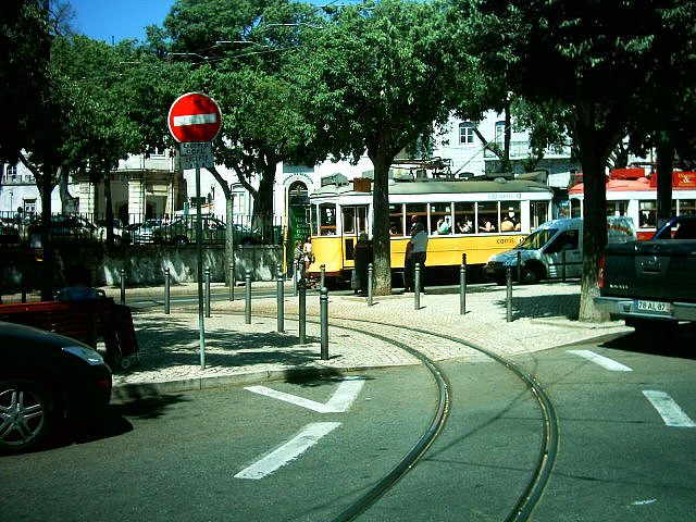 CCFL Graça